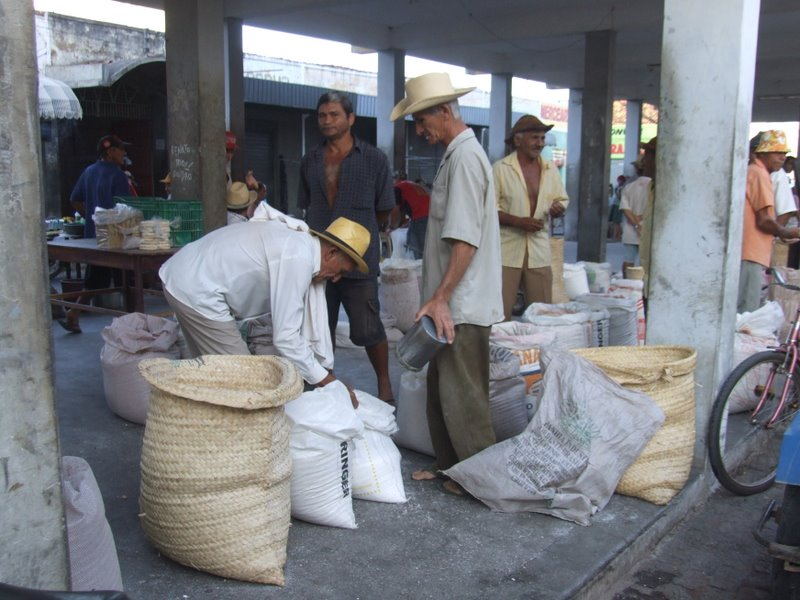 Feira do Sábado